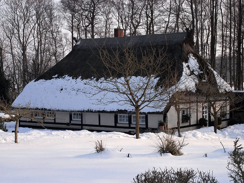 Reetdachhaus in Alt Bukow